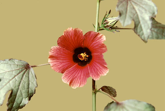 H. sabdariffa. Imagem gentilmente cedida pelo Sr. Marcos Capelini, do site